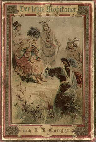 Illustration in Der letzte Mohikaner. Eine Erzählung für die Jugend. Nach J. Fenimore Cooper frei bearbeitet von Paul Moritz. Mit vier Farbendruckbildern nach Aquarellen von G. Franz. Stuttgart, K. Thienemanns Verlag, Gebrüder Hoffmann. (1889).